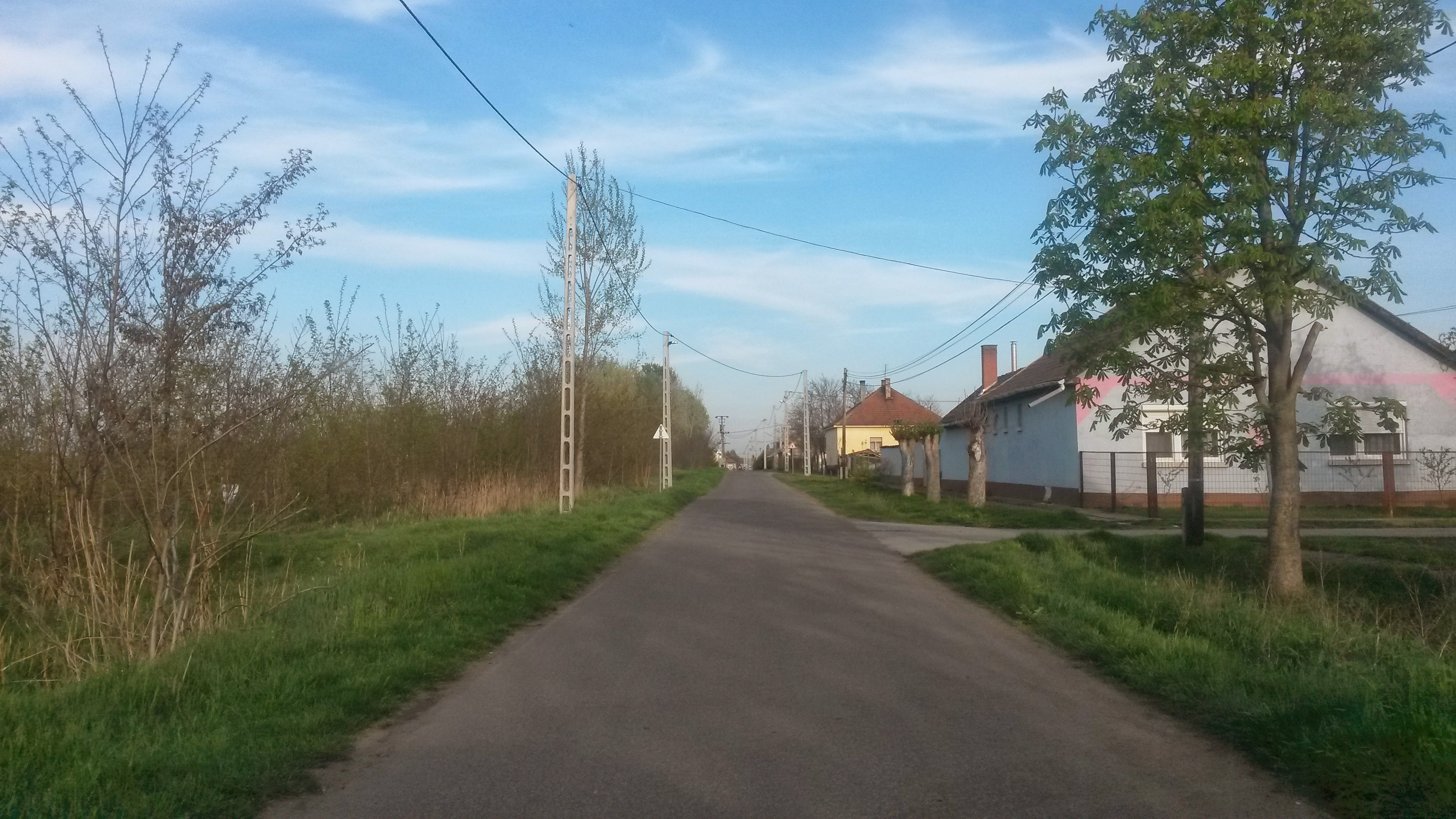 Elek, 5742 Hungary